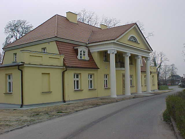 Kalisz Majków, ul. Tuwima 10 - zespół dworski: dwór Lipskich (zabytek nr 191/A)